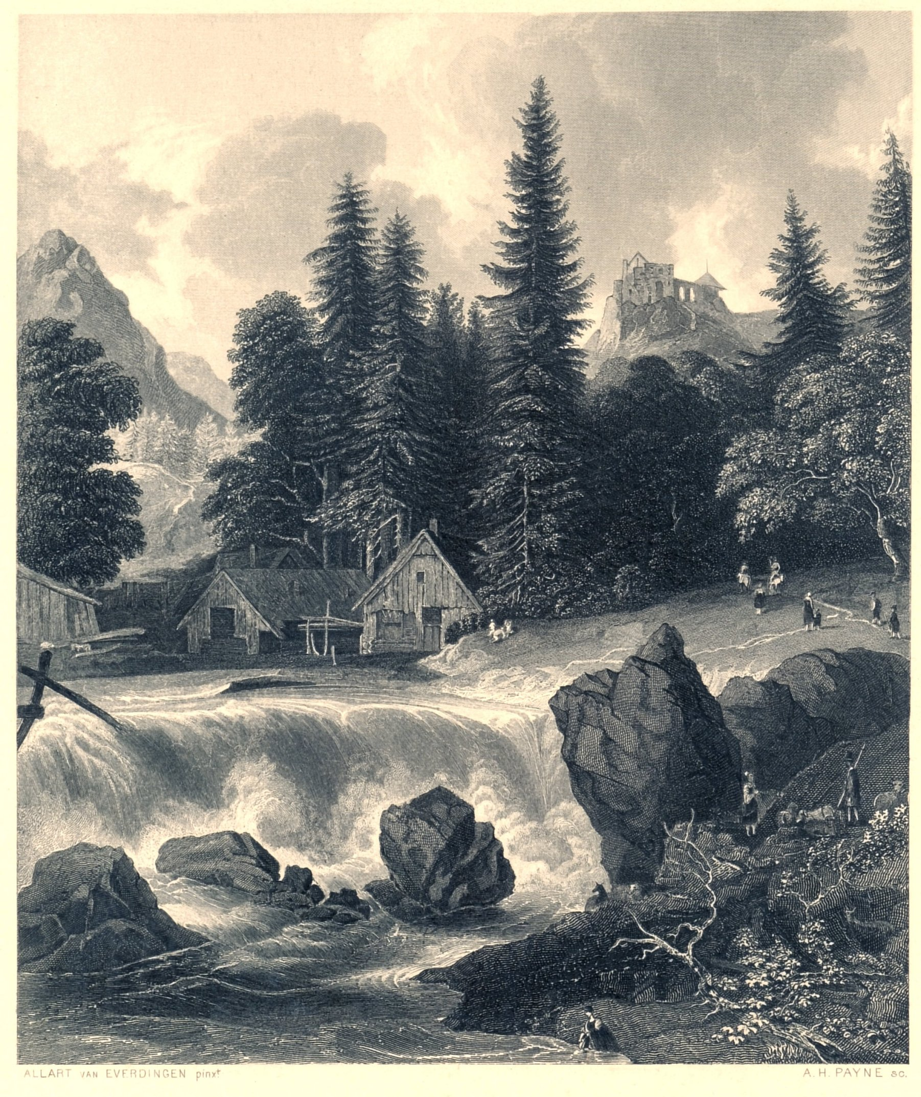 Mountain Landscape - staloryt wg Allart van Everdingen